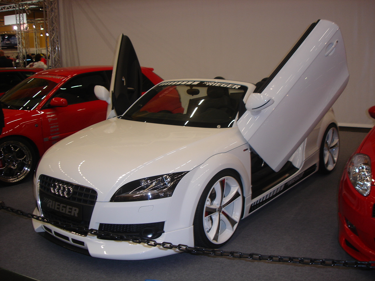 Audi TT Roadster mit Rieger Tuning Kit und LamboStyleDoors